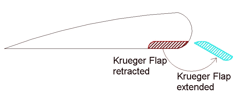 Krueger Flap, Krügerklappe